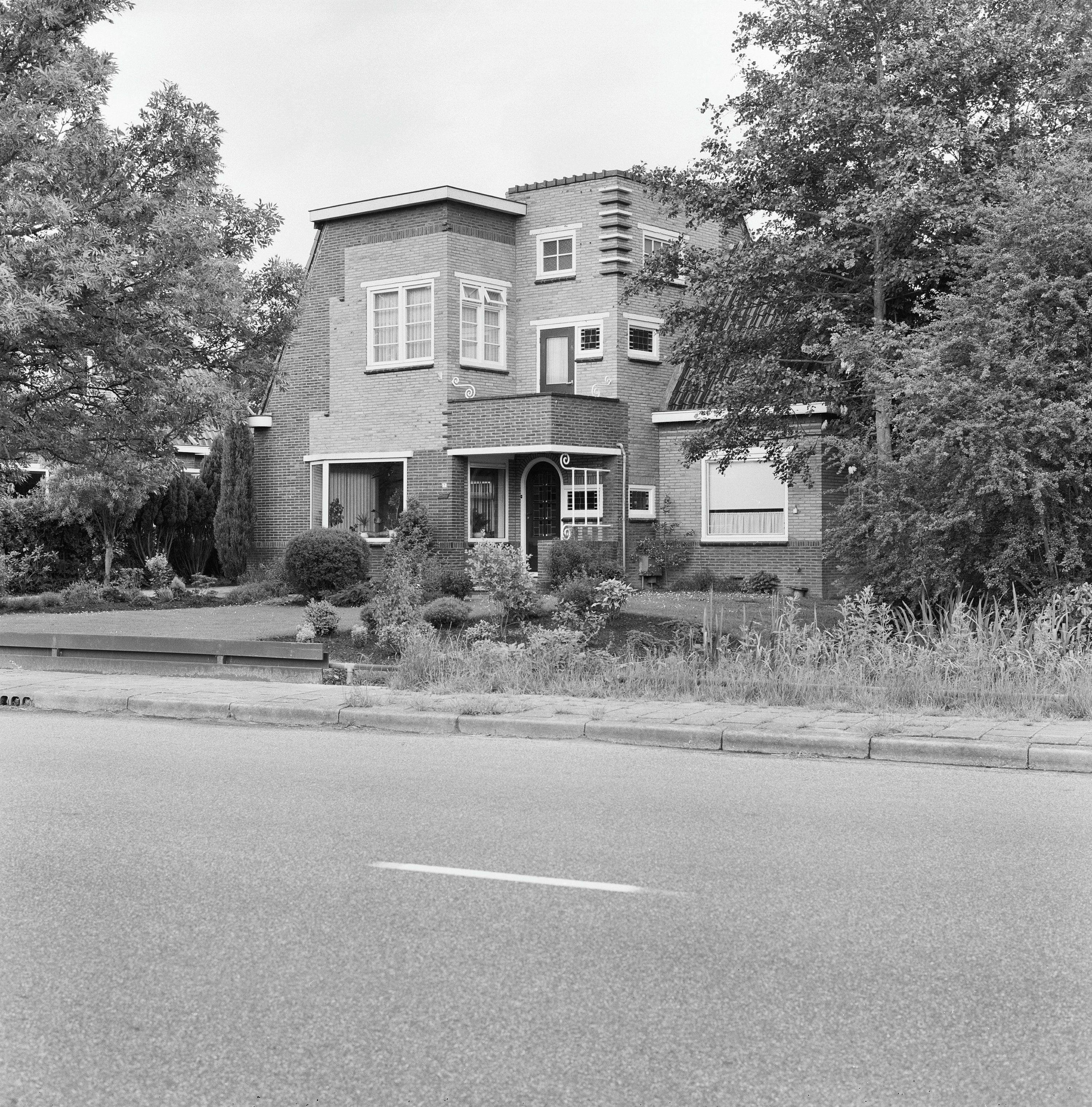 Overzicht voorgevel (opmerking: Gefotografeerd voor Monumenten In Nederland Groningen)